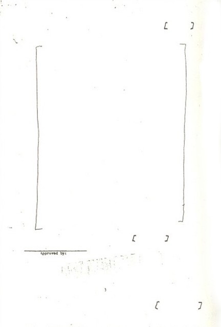 Interner Bericht der CIA über Theo Saevecke vom 8. Januar 1953 Zitat aus Vorblatt des Buches zur Lizensierung: „Except the Preface, Introduction and Conclusion, this is a work of the United States governement and is not protected by copyright in the United States.” -Klammern im Dokument markieren von der CIA vor Veröffentlichung unkenntlich gemachte Stellen. Die dritte Seite des Berichts enthält durch die eingeschränkte Veröffentlichung keine Informationen, verdeutlich allerdings den Umfang der von der CIA unkenntlich gemachten Stellen.